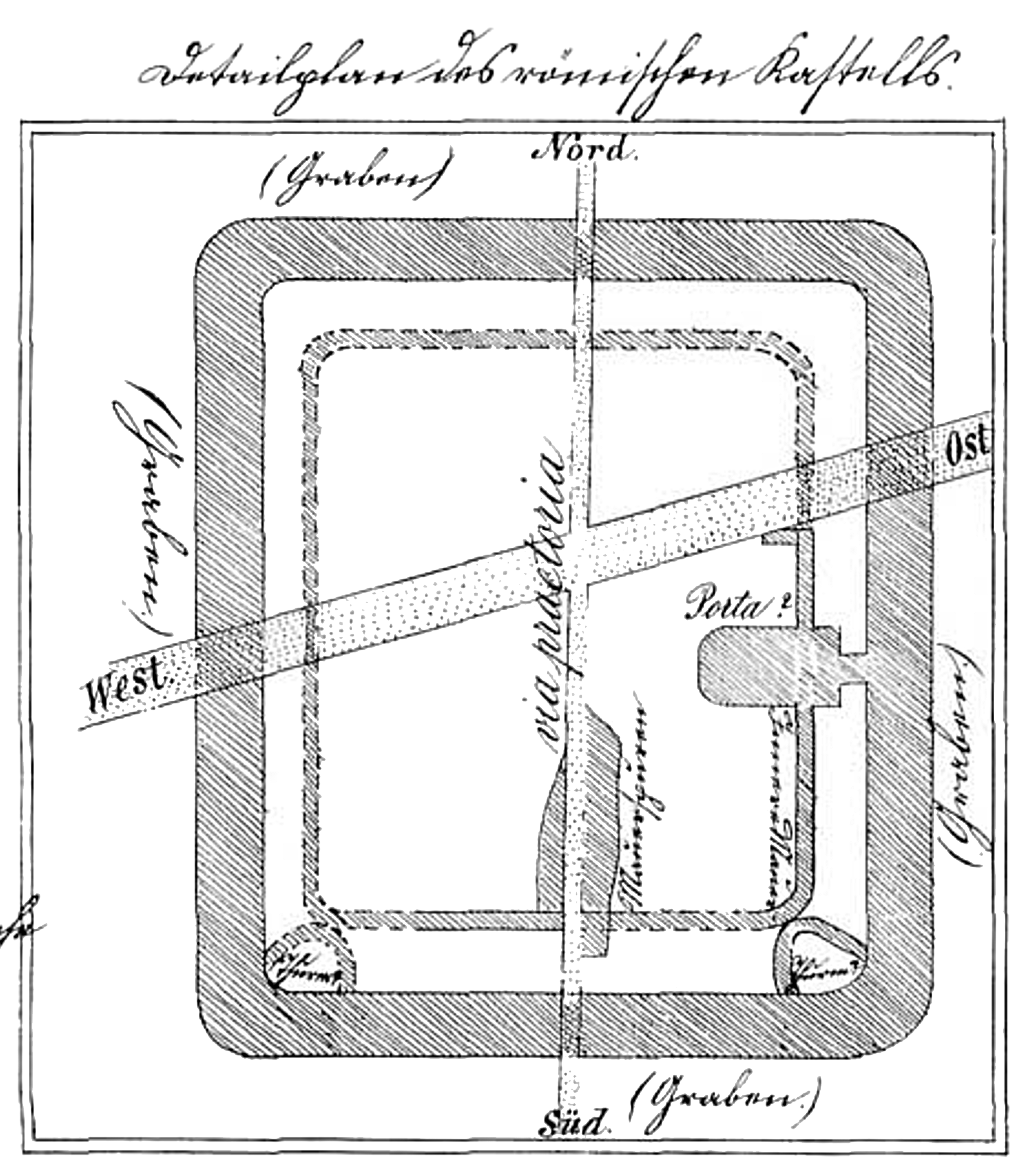 Erste Detailplan zum Kastell Künzing nach den Untersuchungen von Johann Michael Schmid. Quelle: Karl Schmotz: Die Erforschung der Frühgeschichte Künzings von den Anfängen bis zum Ende des 19.Jahrhunderts . In: Deggendorfer Geschichtsblätter. Heft 7, 1986. S. 160 ff.